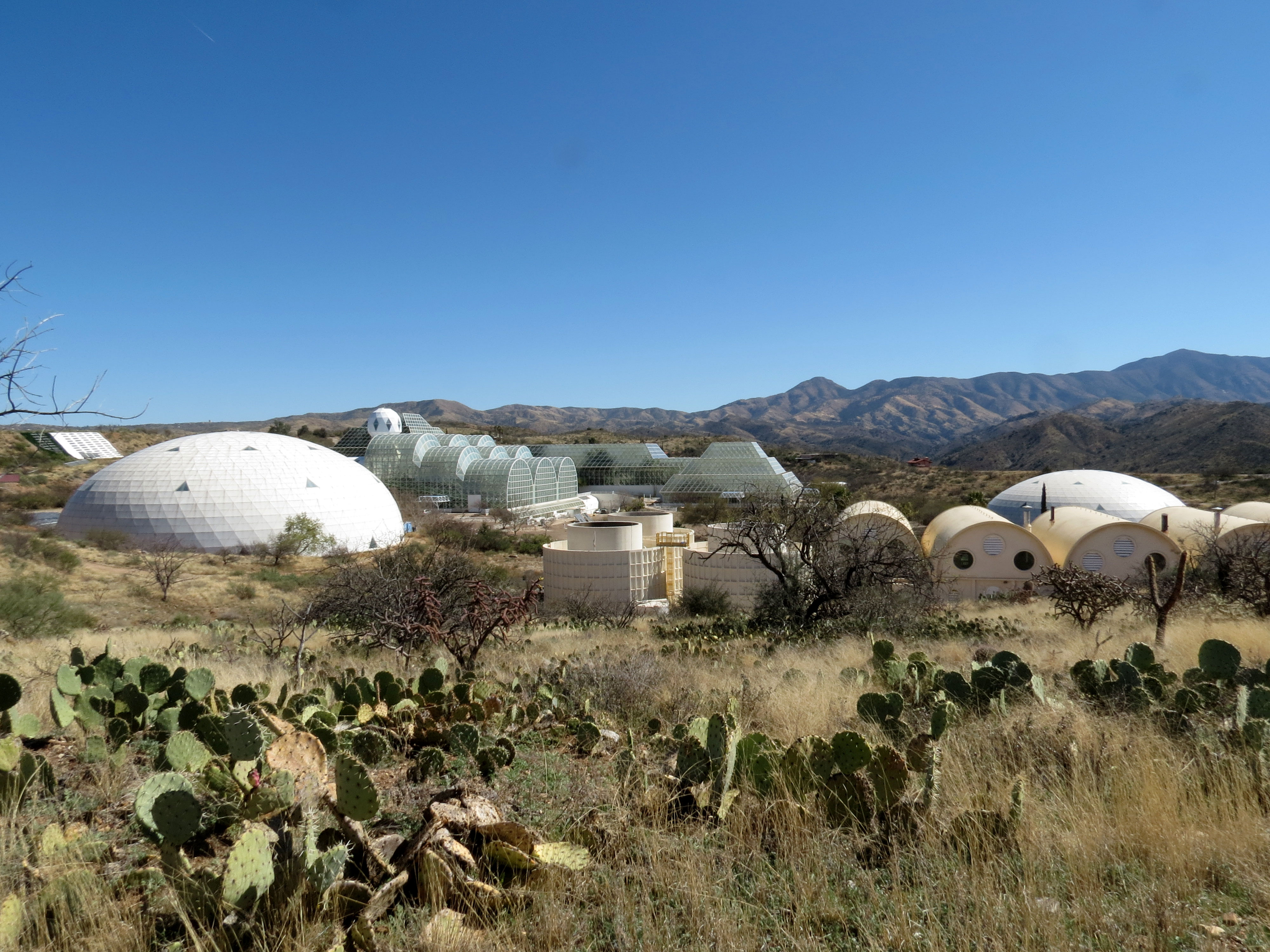 Oracle, Arizona, USA.